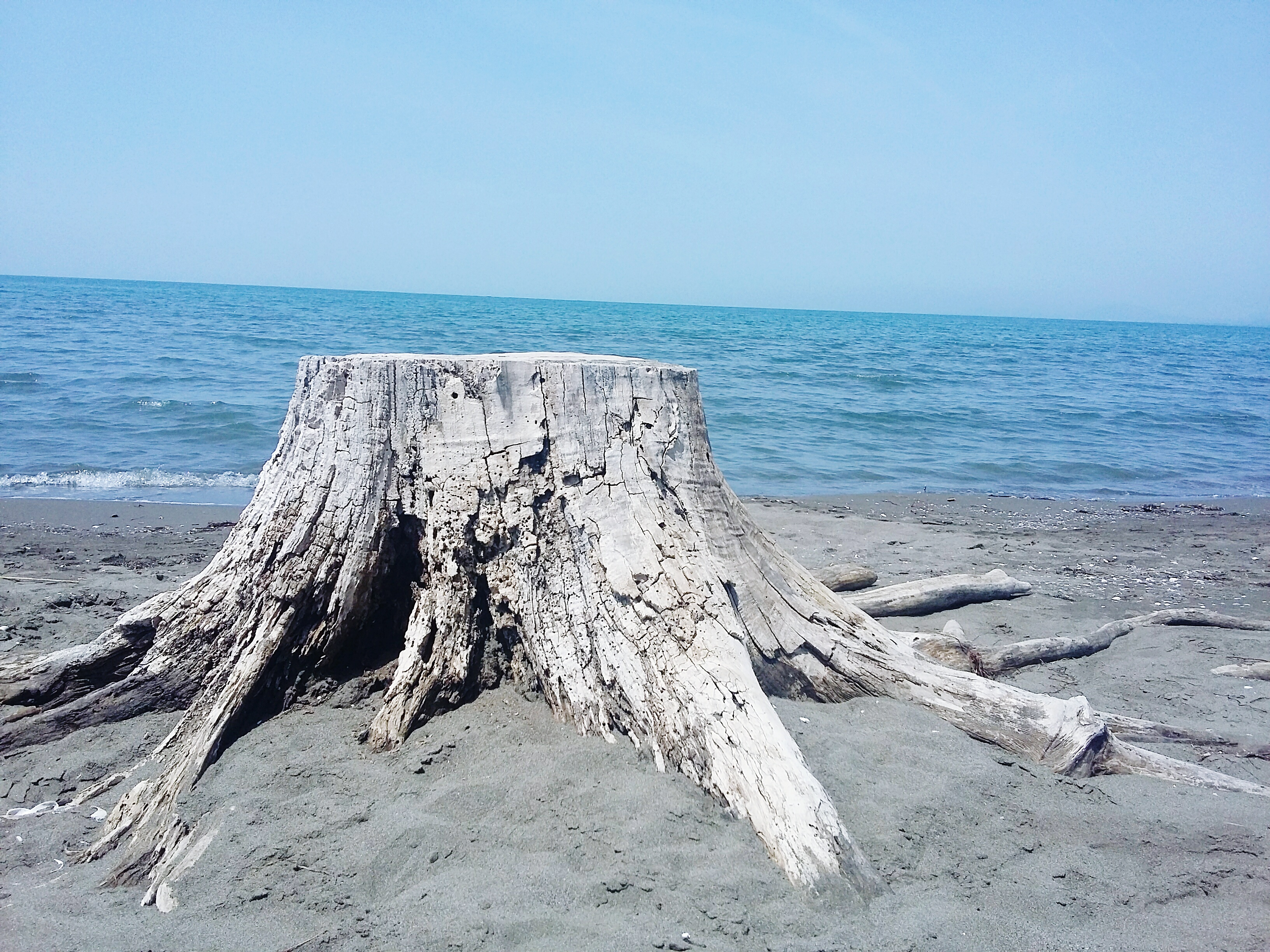 Kune-Vain-Tale, Lezhe